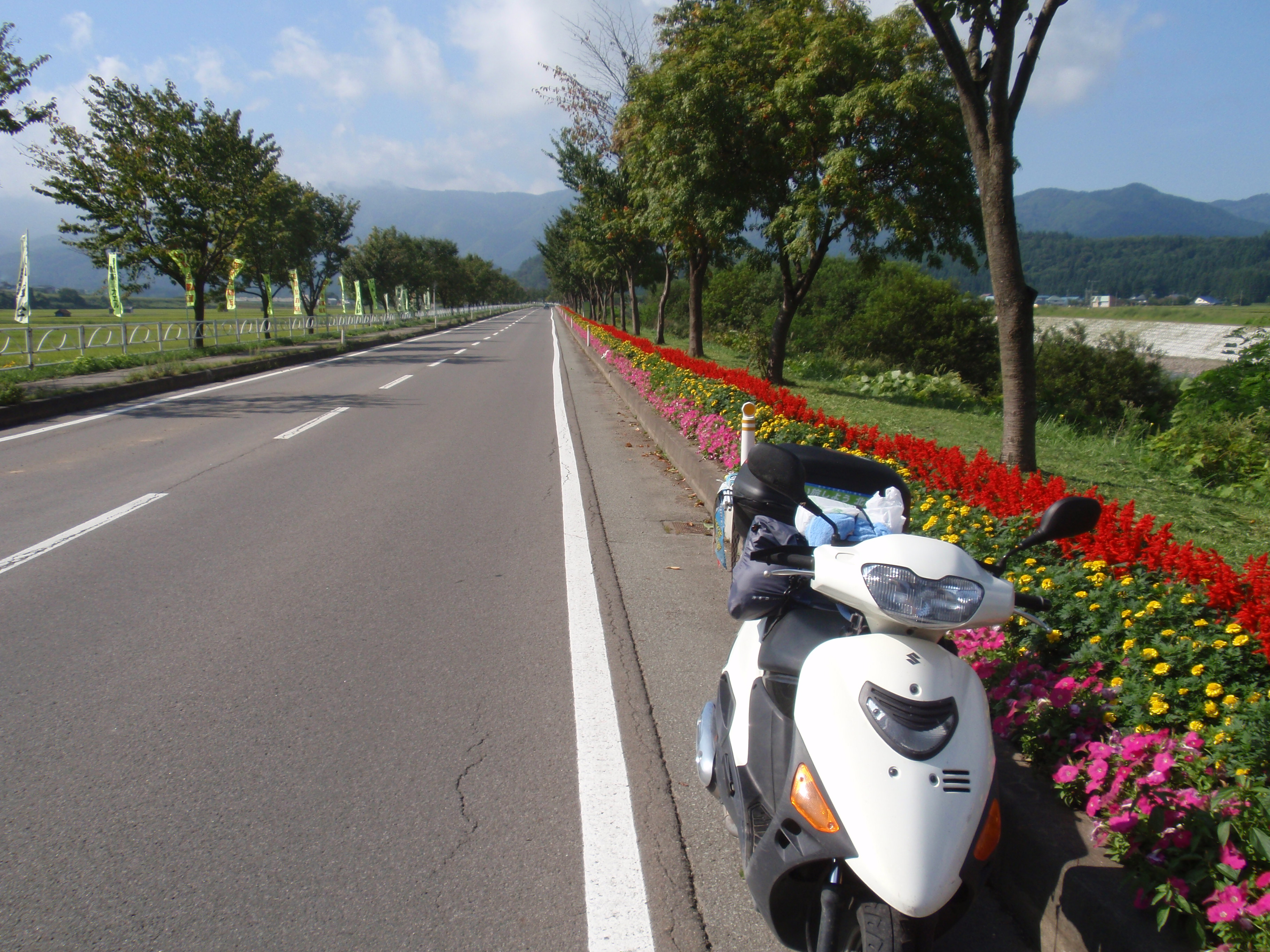 国道341号、鹿角市谷内付近、熊沢川沿いの道。地元自治会により花壇が整備されている。